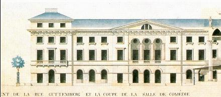 Historischer Entwurf des Département Baumeisters Eustache de St. Far für den Gutenbergplatz Mainz, Salle de comedie. Es wurde lediglich ein Teil des Leitbaus am Gutenbergplatz 1 realisiert, der heute noch steht.